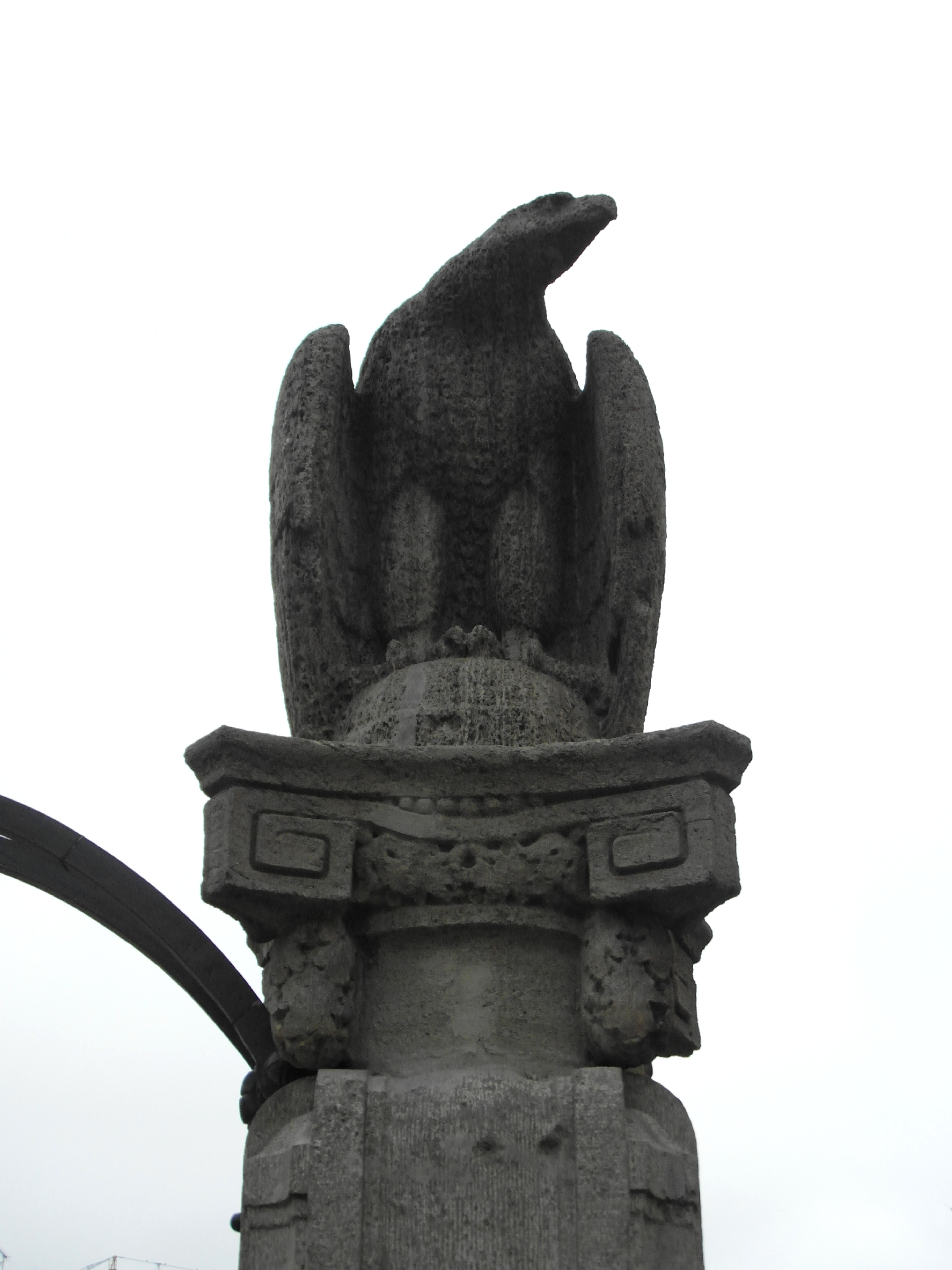 Linie U3